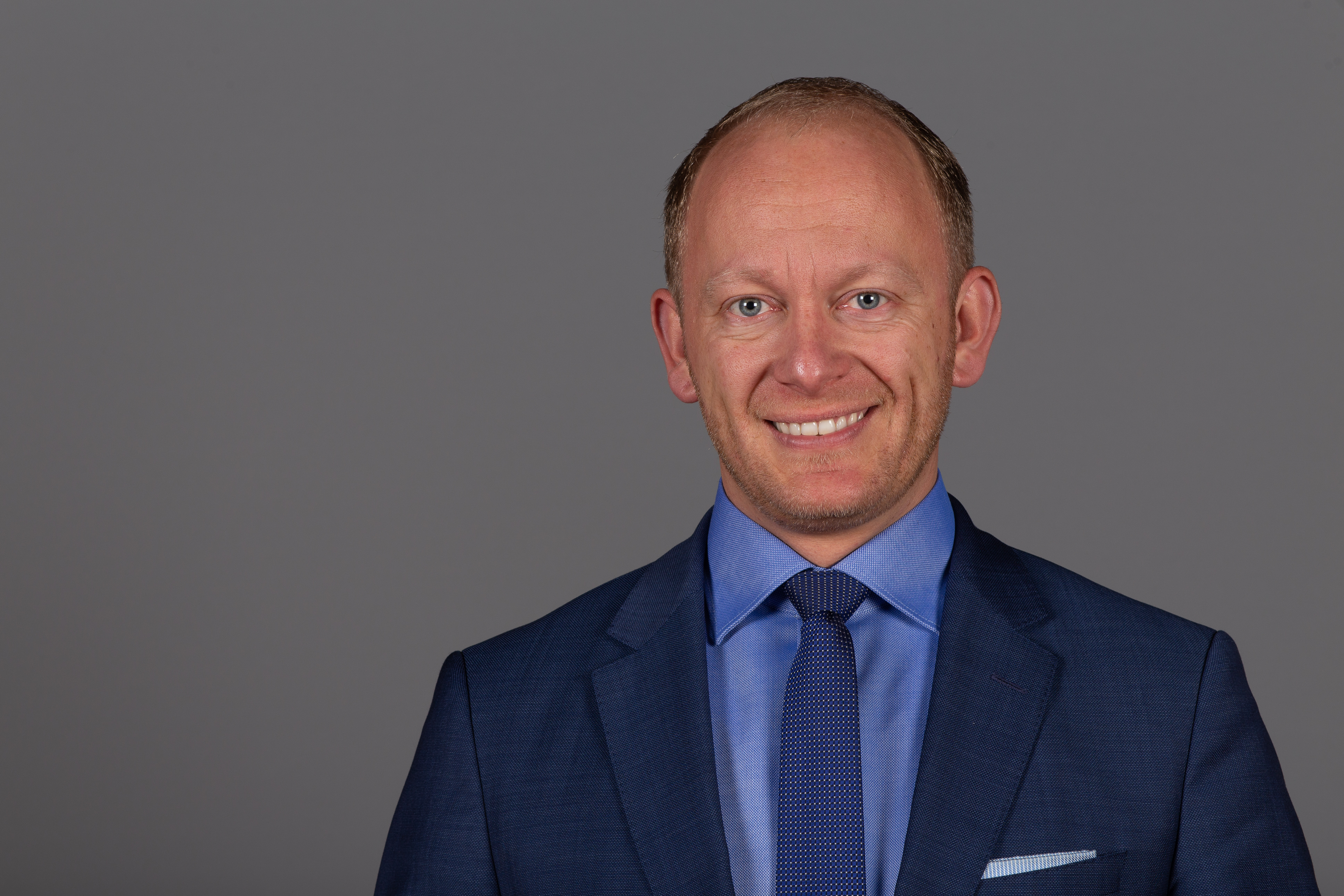 Abgeordnete(r) der Bürgerschaft der Freien und Hansestadt Hamburg Carsten Ovens